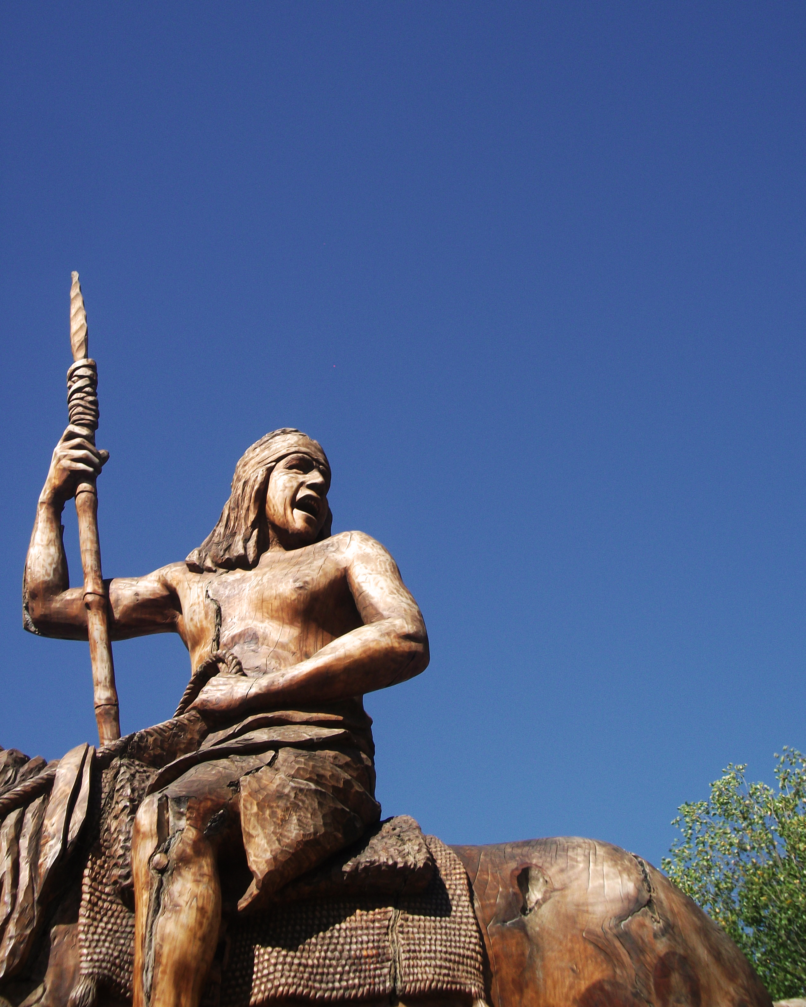 Mapudungun: Pelontraru ( Purenü mapu, ? - 1620 p.), doy wünengechi mapuche tokingefuy, Mapuche kuyfi nütram mew mülekelu. Trokikealu kiñe pichi lingko, wewafi ka lhangümfi ti wingka ülmen, Martín García Oñez de Loyola pingey, Kuralawe mew mülelu. Müchay trokilkünofi Füta Awkan ñi Toki, trokikealu kom lingko, rangi Fiw Fiw lhewfü ka Füta Wapi Chillwe. Fey ta Füta awkan, rangi 1598 ka 1604 tripantu mo, elufi pu mapuche ñi kisungünewün, 200 tripantu mew rupalu. Feychi estatua pingey fey ti mew, ta müley wekun Purenü ñi Wingka Malal mew, pu chentu pepiadkintufi feyti awkan adadkintun.